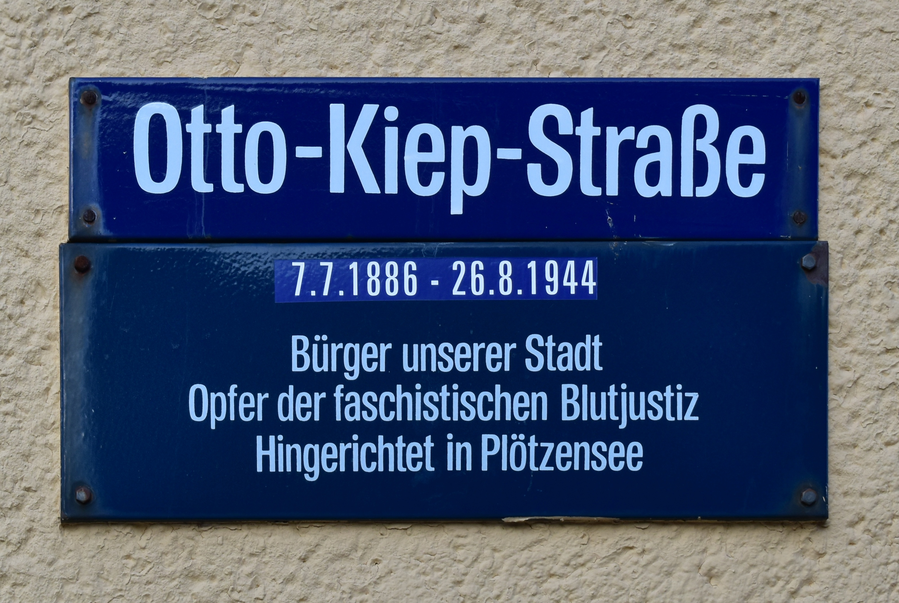 Straßenschild in Ballenstedt mit Erklärung. Otto-Kiep-Straße